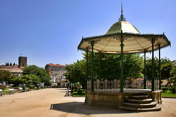 Lamego - Jardim da Republica